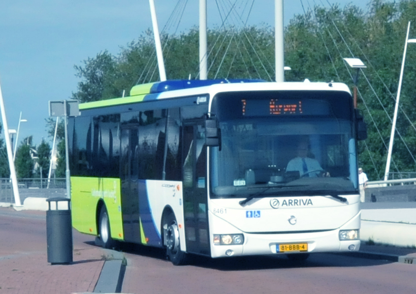 Arriva bus 6461 van het type Irisbus Crossway LE te Lelystad.